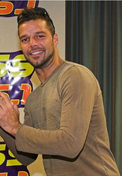 Ricky Martin fotografiado por un fanático.